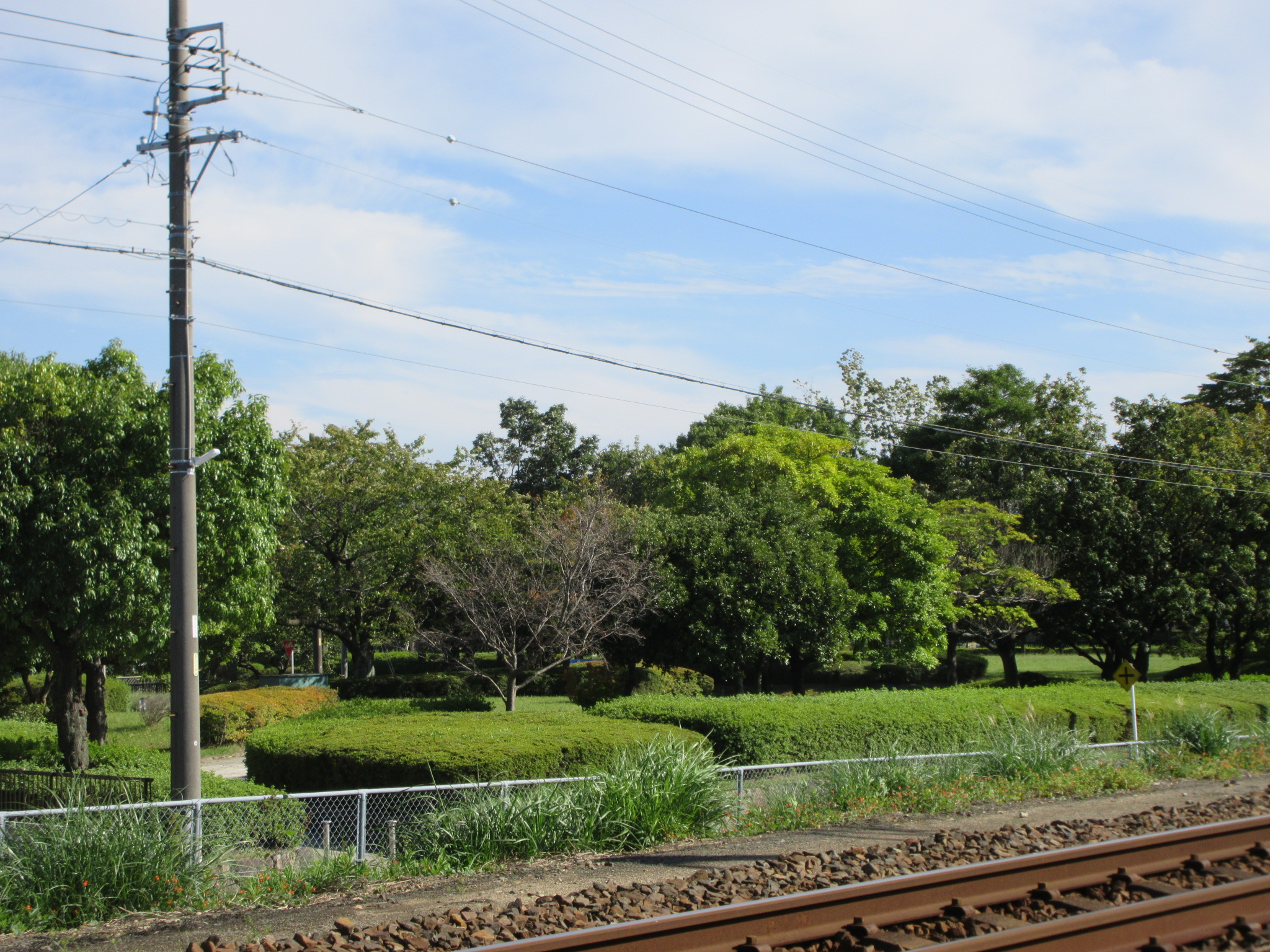 真宮遺跡公園（岡崎市真宮町、六名）